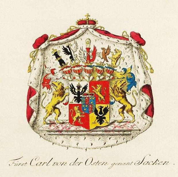 Wappen des Fürsten Carl von der Osten genannt Sacken (preußischer Fürstenstand 1786 von König Friedrich Wilhelm II.)